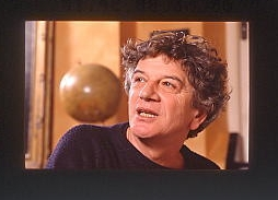 Portrait du compositeur René-Louis BARON